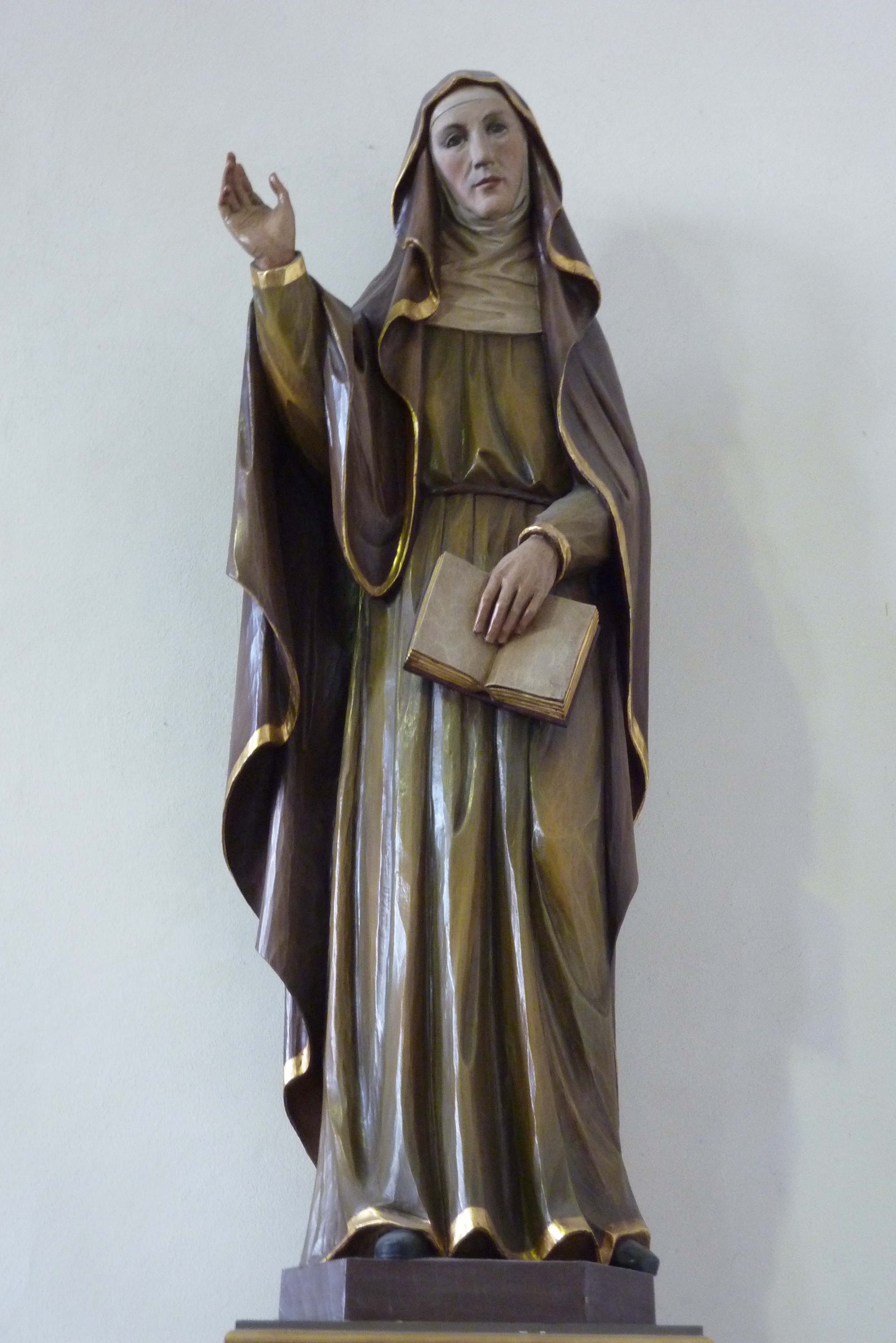 Klosterkirche Heilig-Kreuz des Klosters Kalvarienberg in Ahrweiler, Statue der hl. Angela Merici